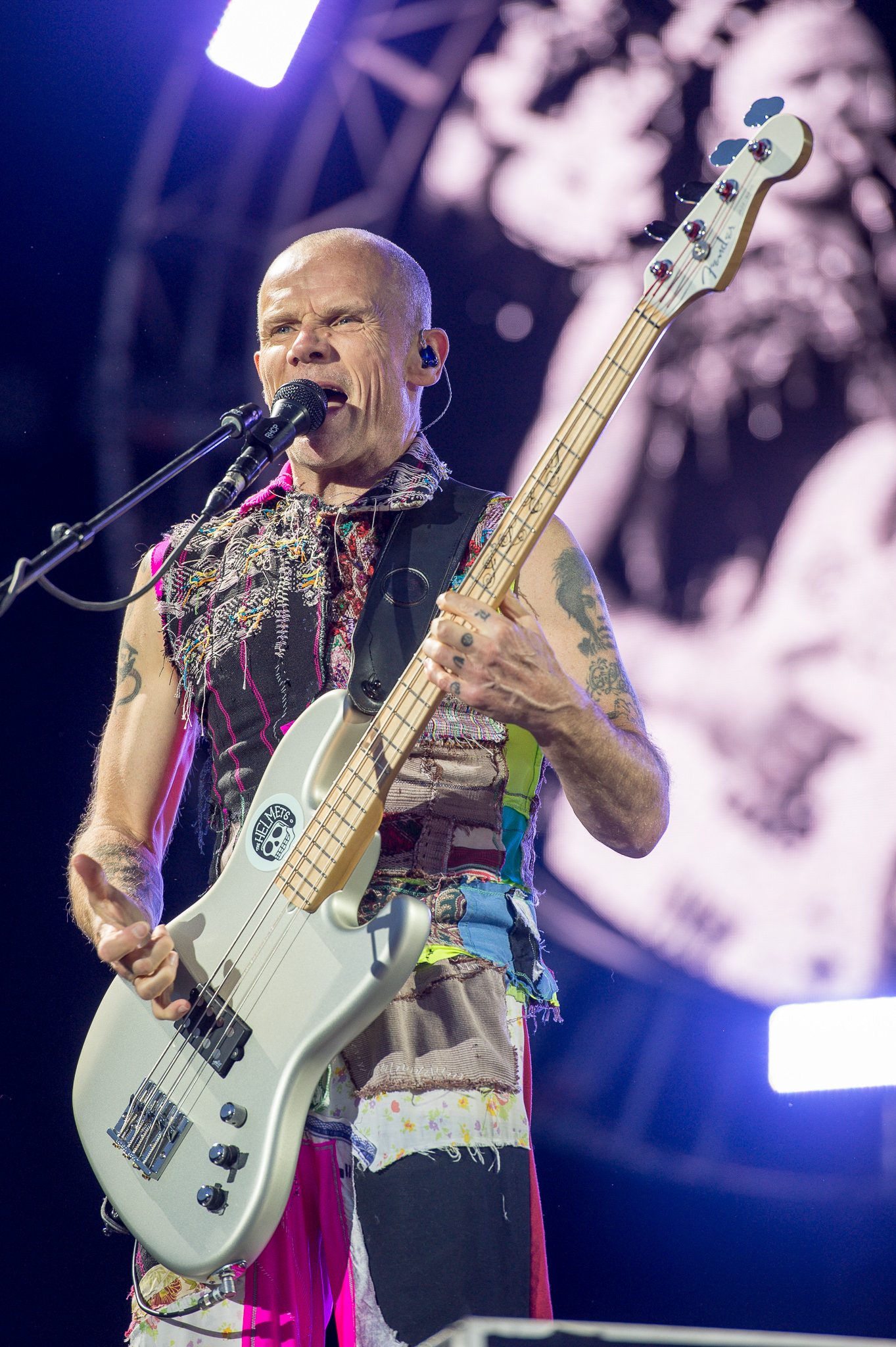 ARGO-Konzerte,Festival,Konzert,Livekonzert,Livemusik,Michael „Flea“ Balzary,Musik,Red Hot Chili Peppers,RiP,Rock im Park 2016,Seat Zeppelin Stage